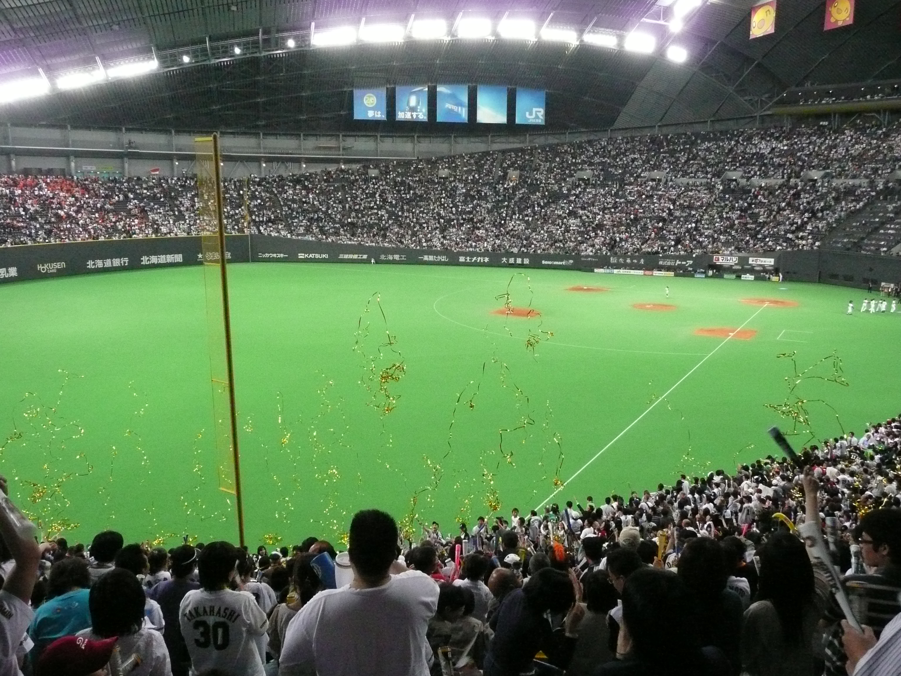 日ハム vs 巨人